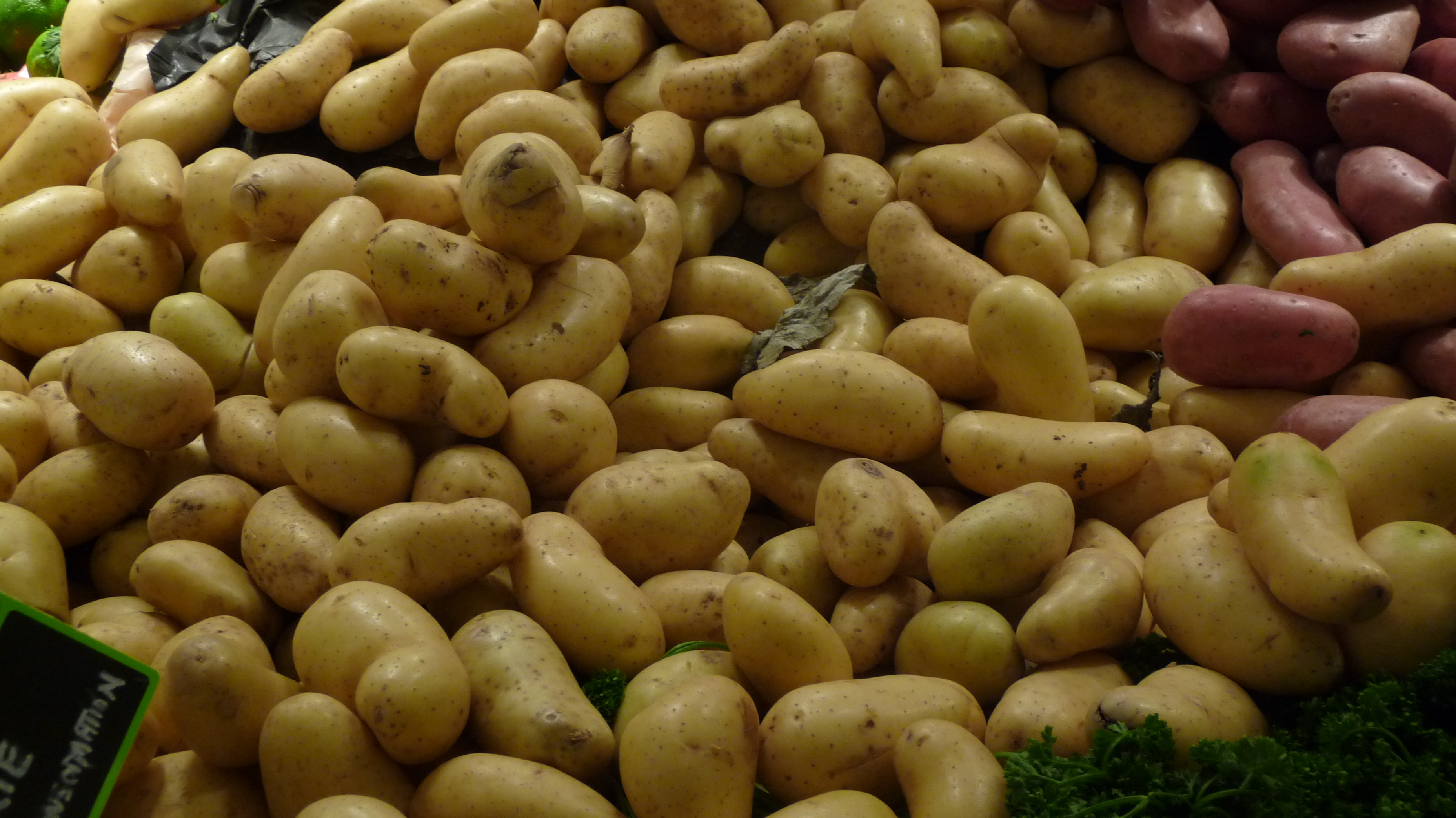 Variété de pomme de terre (Solanum tuberosum) 'Amandine'